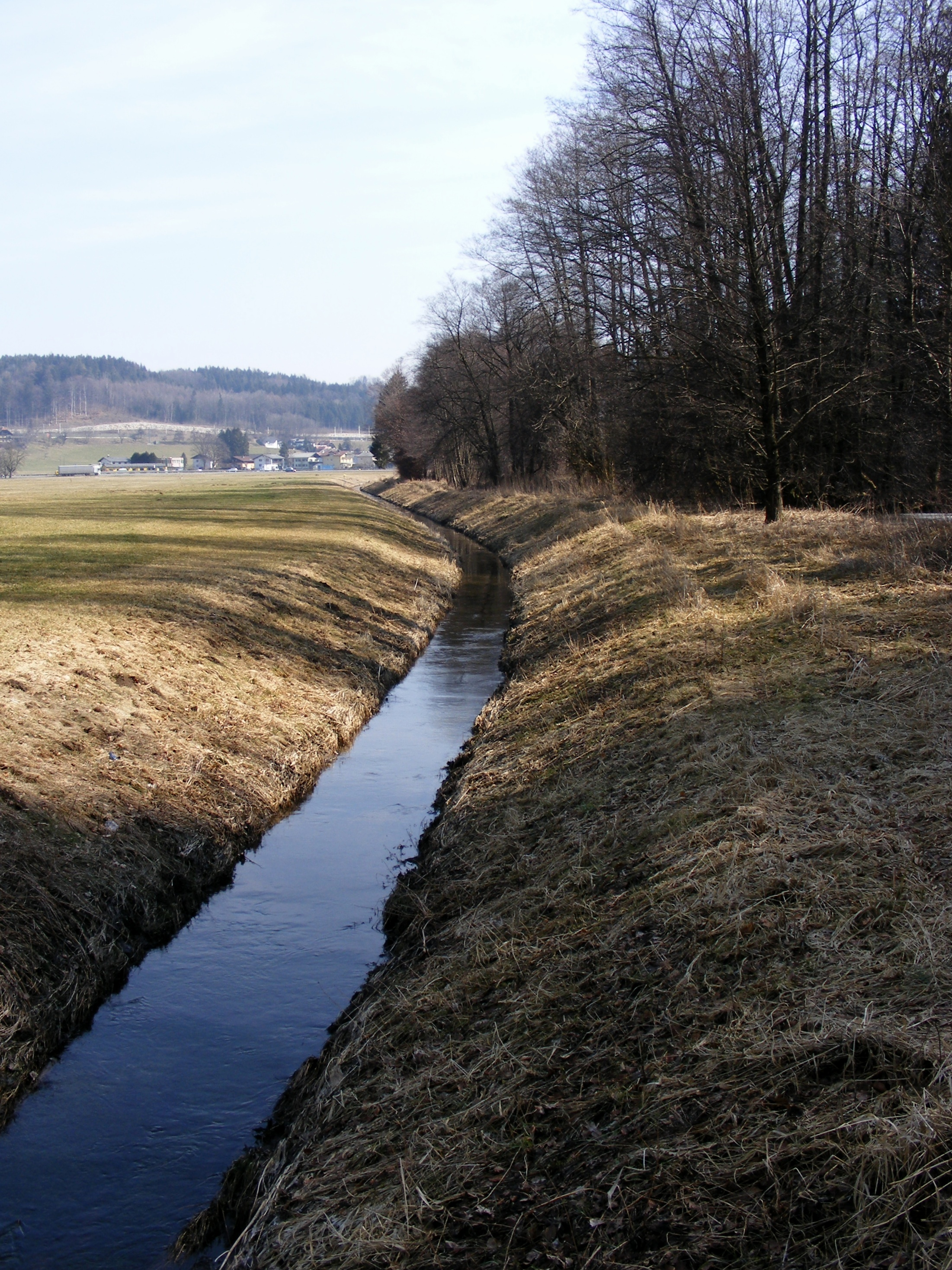 Der reglierte Plainbach am Nordfuß des Plainbergs in Bergheim, Land Salzburg, Österreich